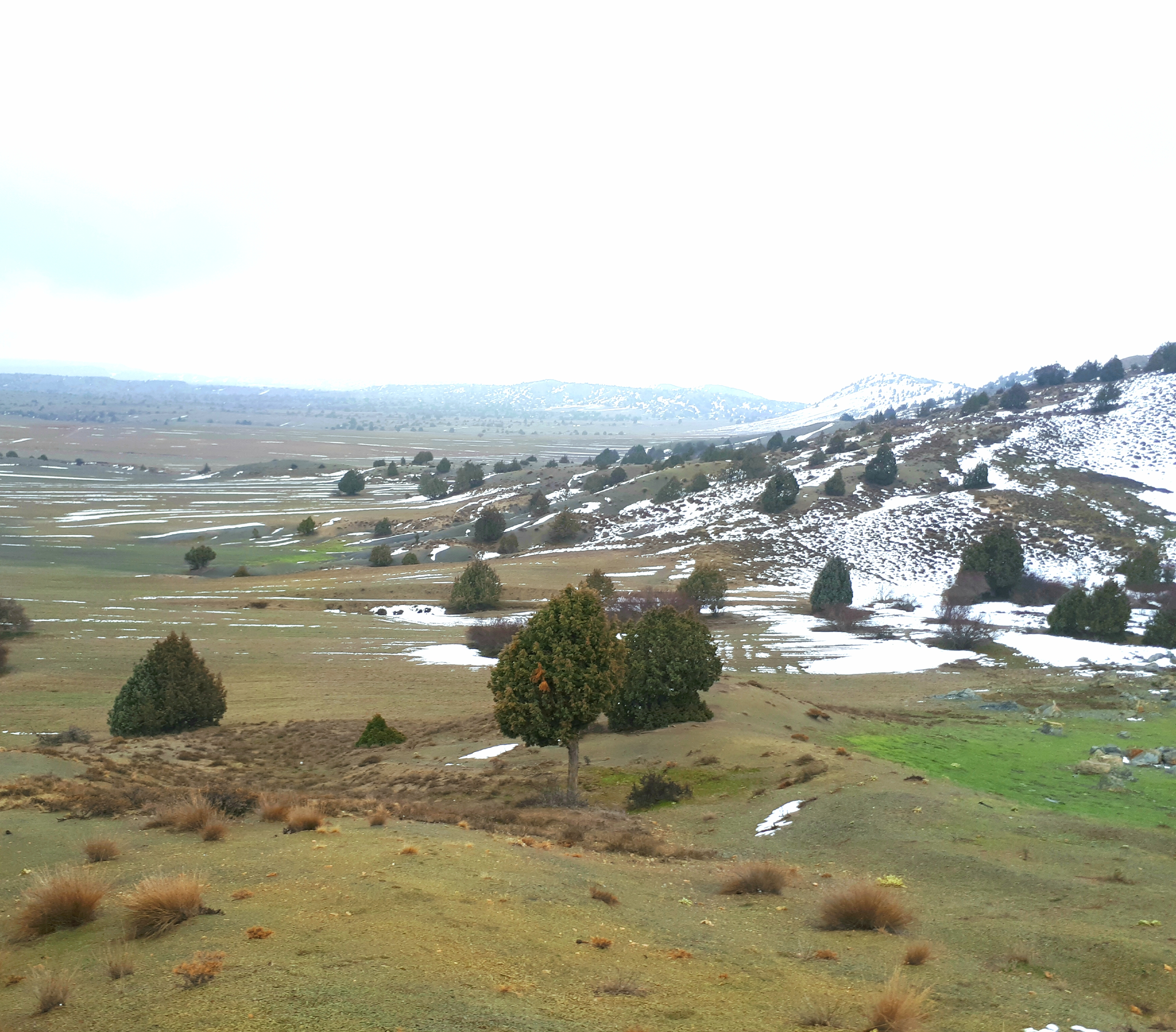 جنگل های تنک اورس در رشته کوه کپه داغ در خراسان شمالی